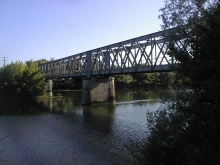 Vue du pont de salans